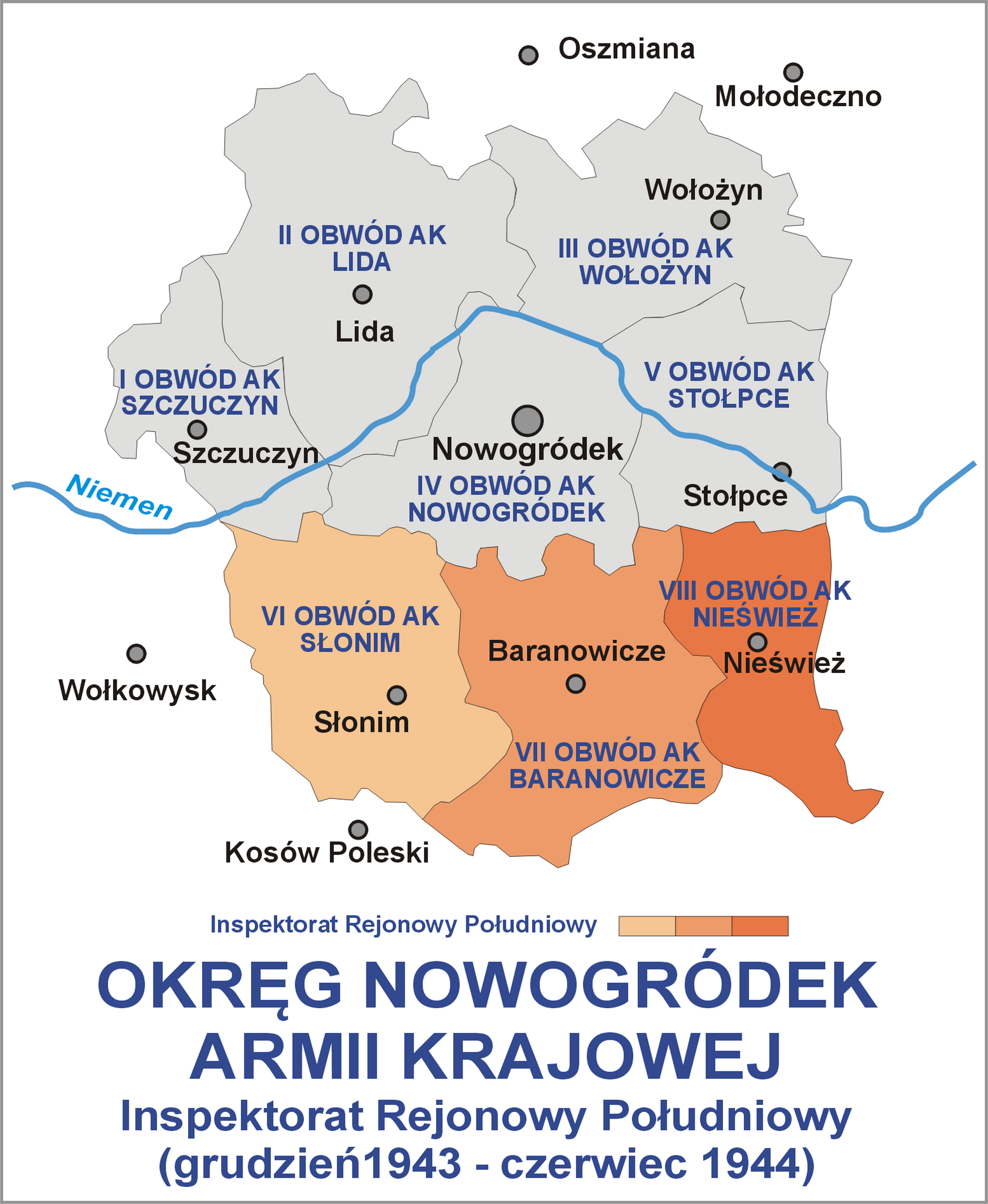 Okręg Nowogródek AK - Inspektorat Rejonowy Południowy